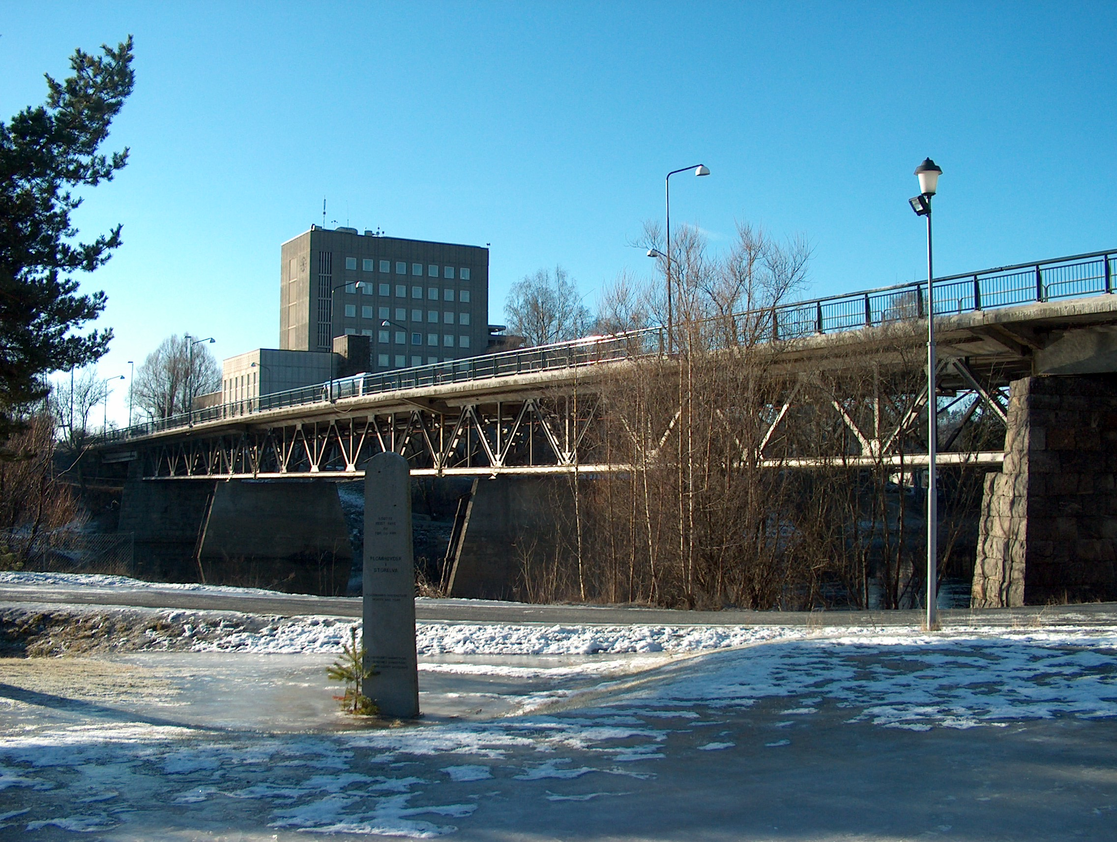 Kvernbergsund bru (Ringerike, Norway)